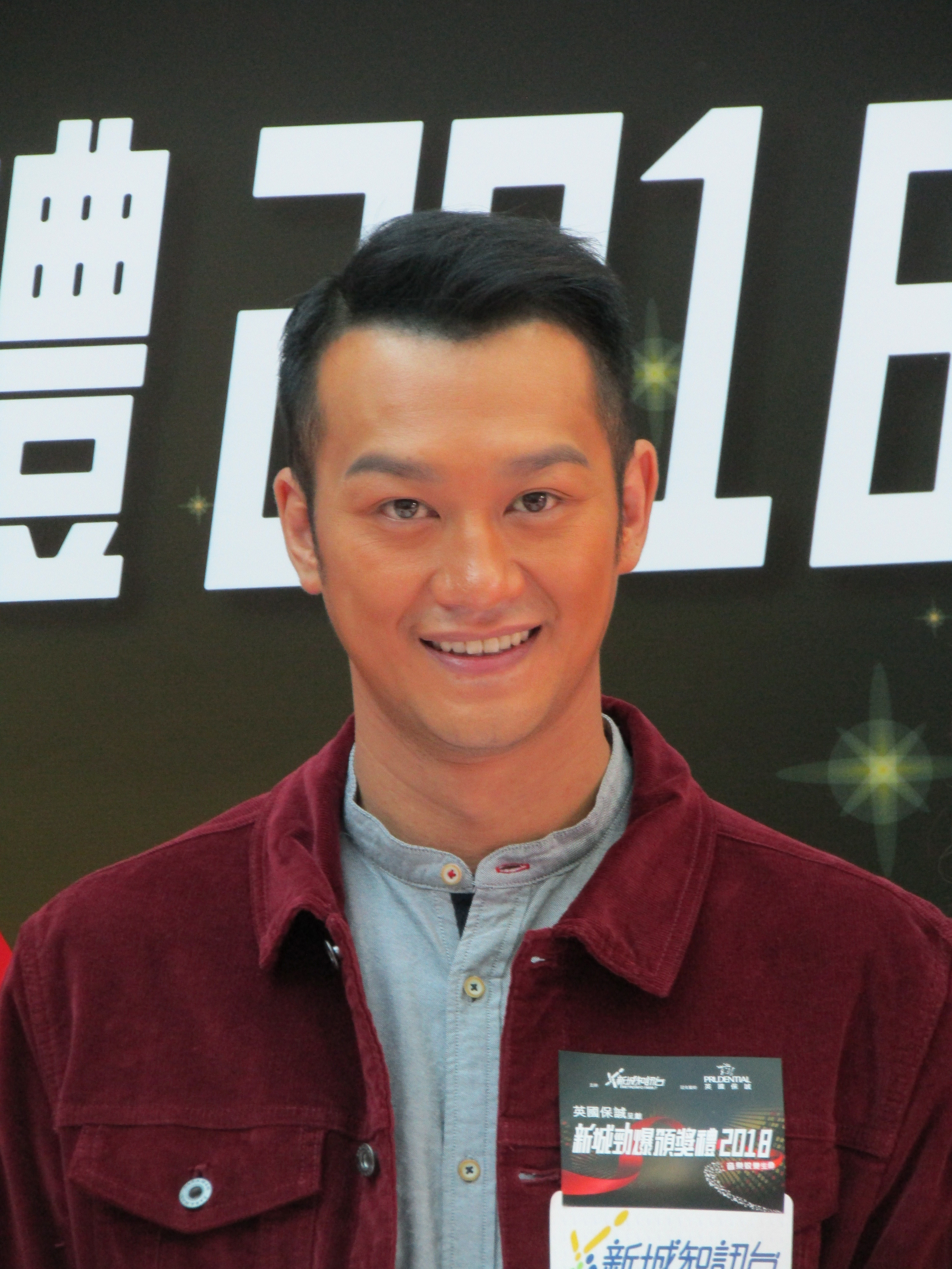 中文（香港）: 吳浩康於新都城中心二期演出